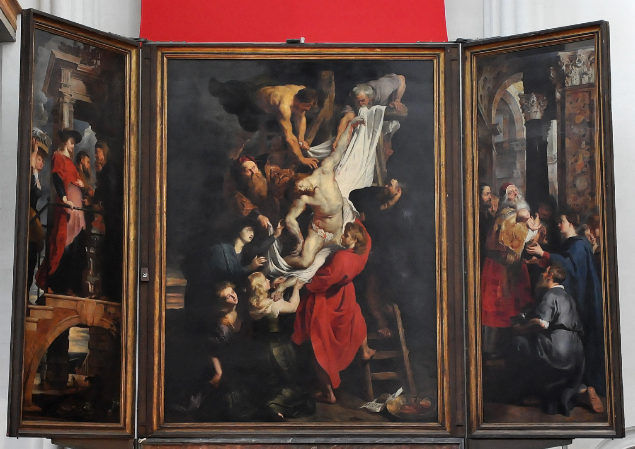 De kruisafneming (1611-1614) - Peter Paul Rubens in de OLVkathedraal te Antwerpen